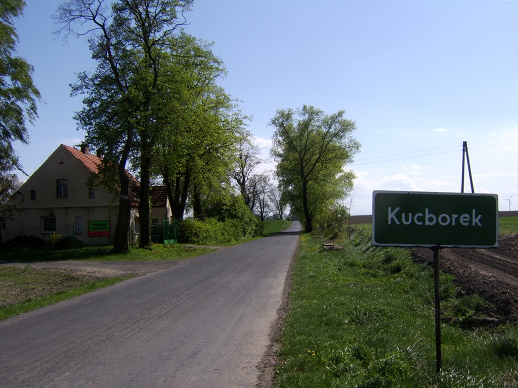 Wieś Kucborek